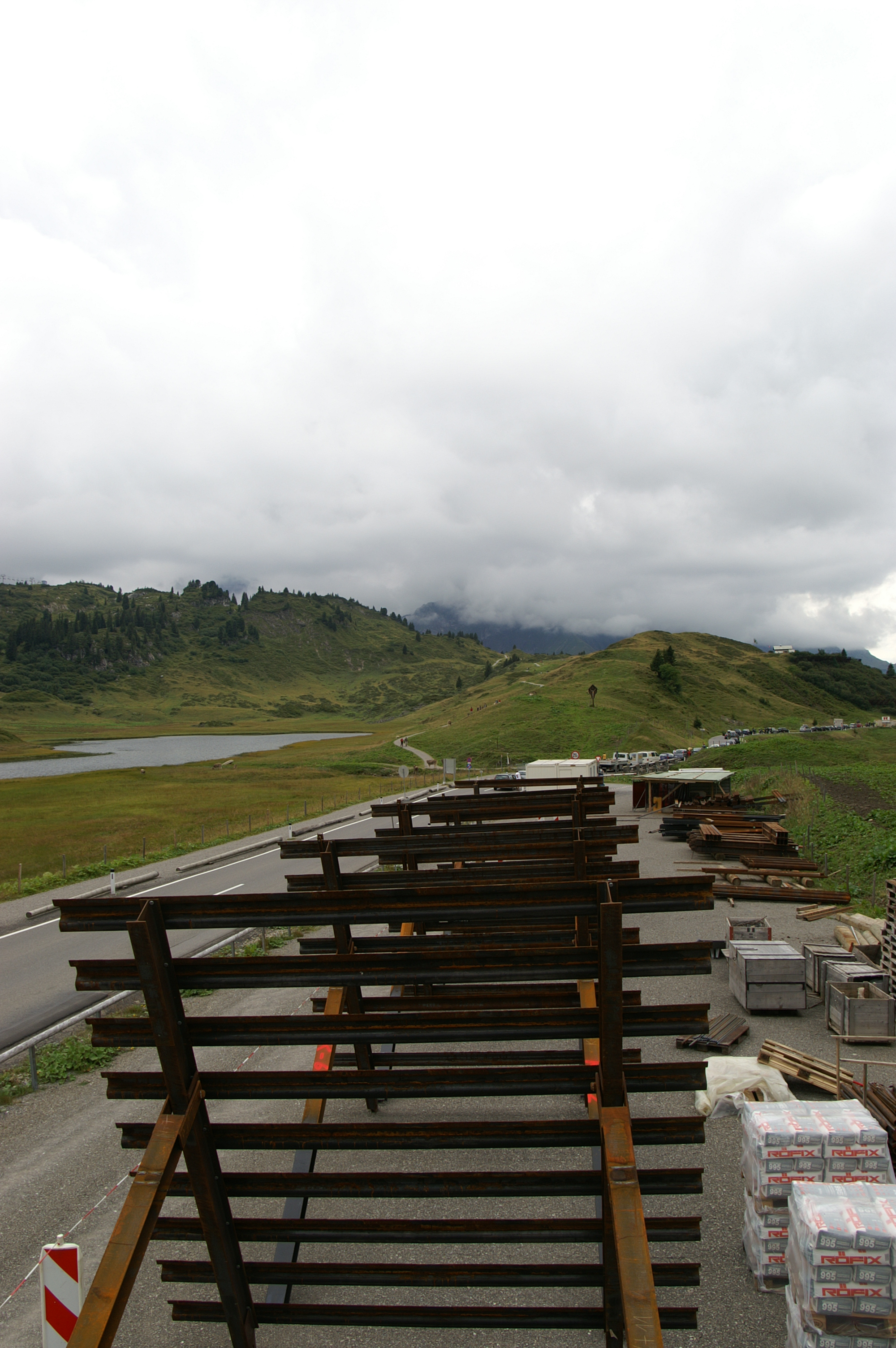 Stahlschneebrücke (Lawinenfangzaun) Vormontageplatz am Hochtannbergpass im Bregenzerwald , Vorarlberg